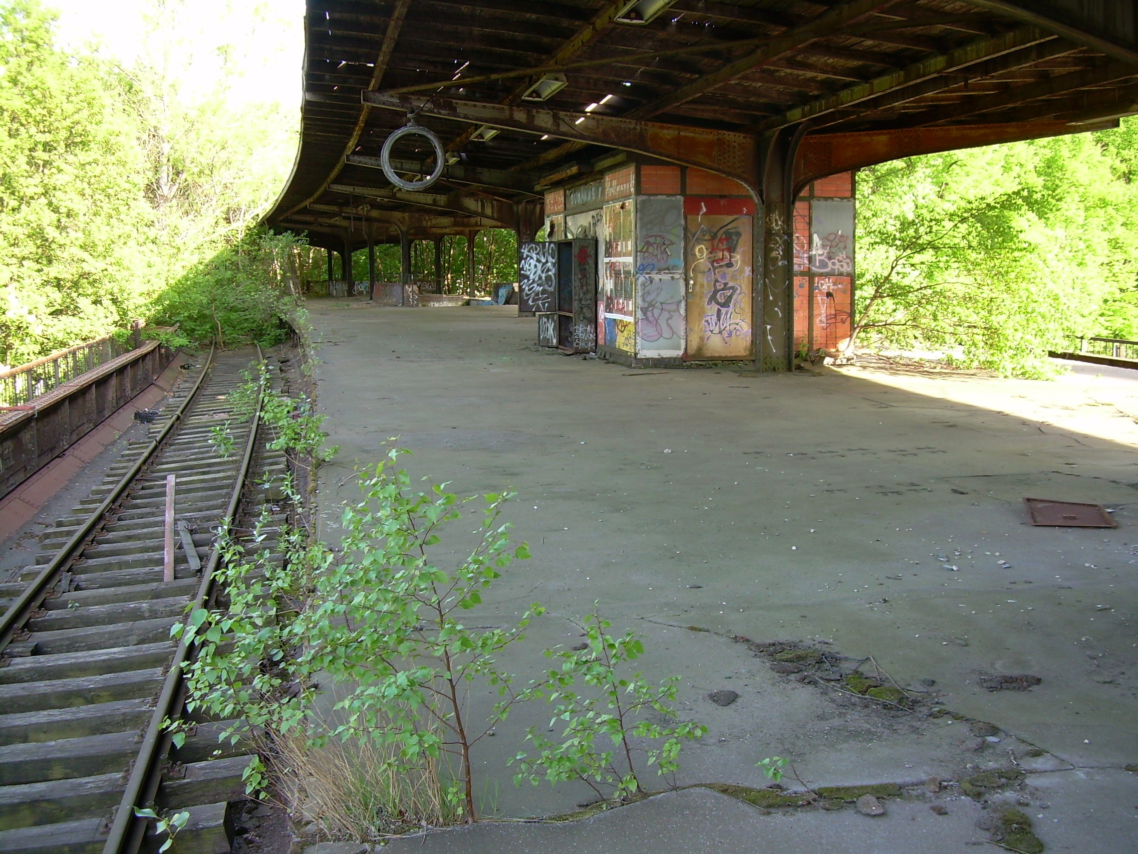 Bf. Siemensstadt